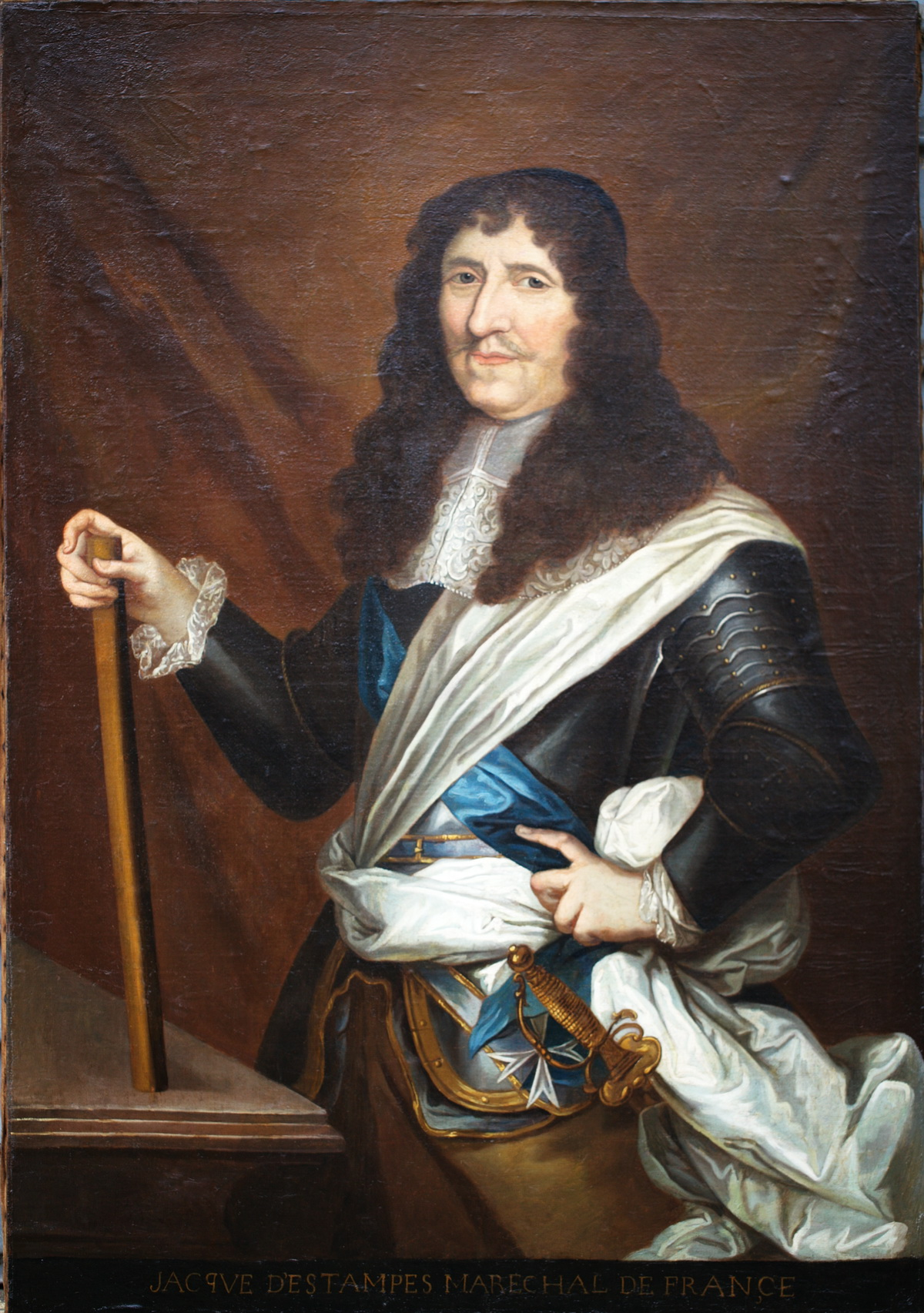 "Jacques d'Estampes, Marechal de France" Ecole Française Du XVIII Portraits De Jacques d'Estampes